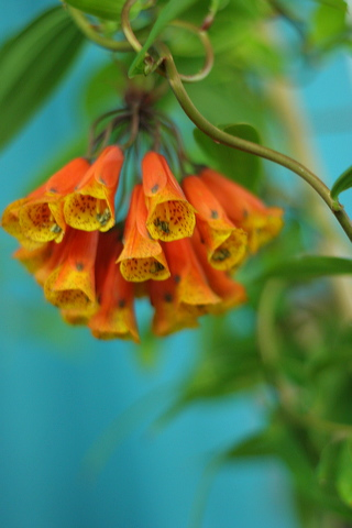 Bomarea caldasii (Kunth) Asch. & Graebn.